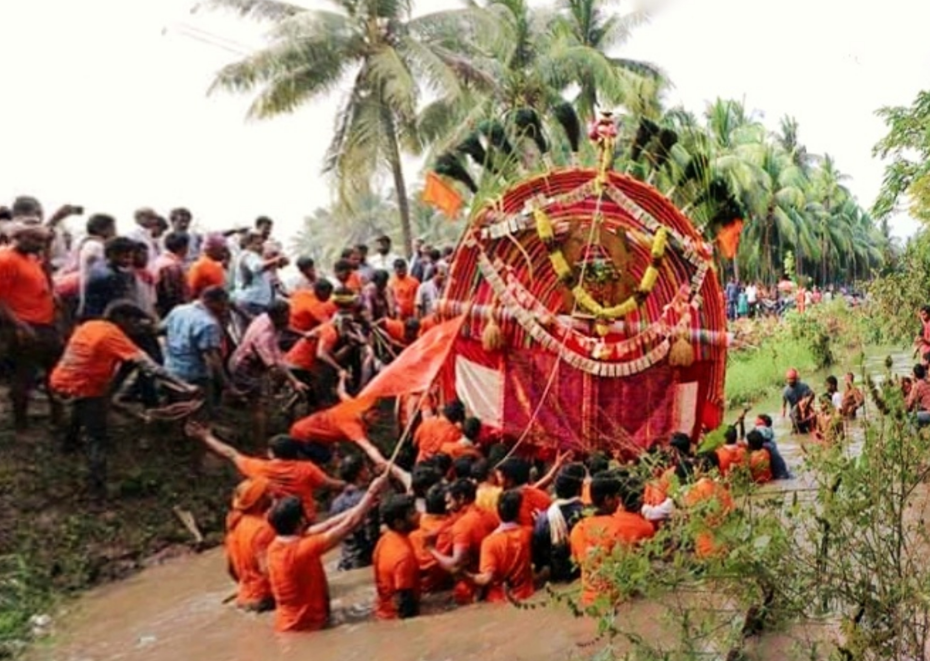 ప్రభలు తీసుకొస్తున్నా దృశ్యం